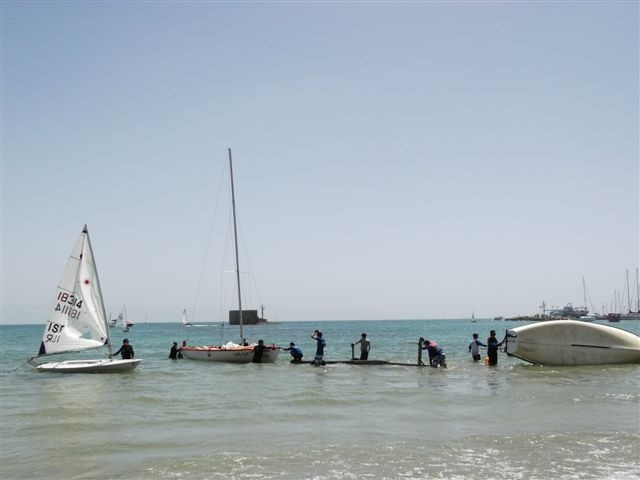 השיט בחוף קציני ים מחייב כניסה למים